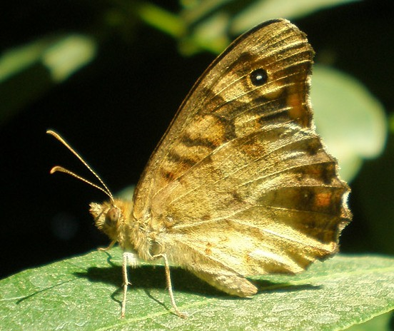 Pararge aegeria aegeria revers. Tàrrega